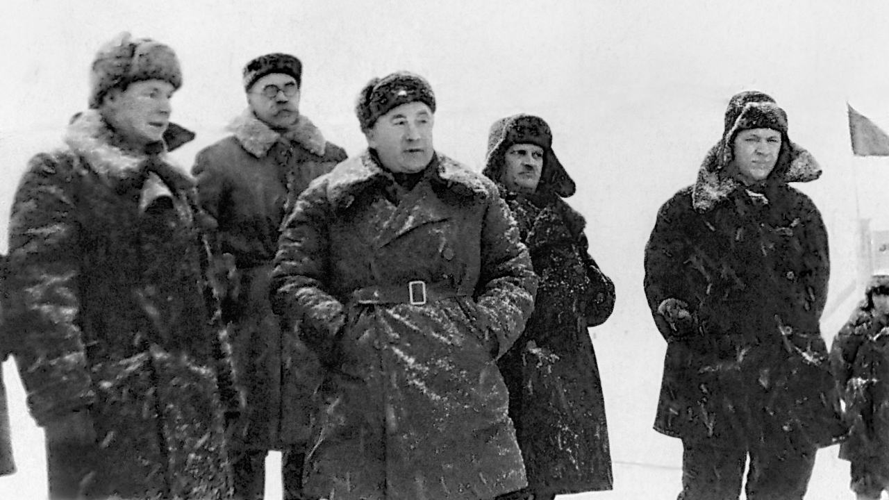 Мальцев Михаил Митрофанович, Фомин Яков Яковлевич Transliteration: Mal'cev Mihail Mitrofanovich, Fomin Jakov Jakovlevich